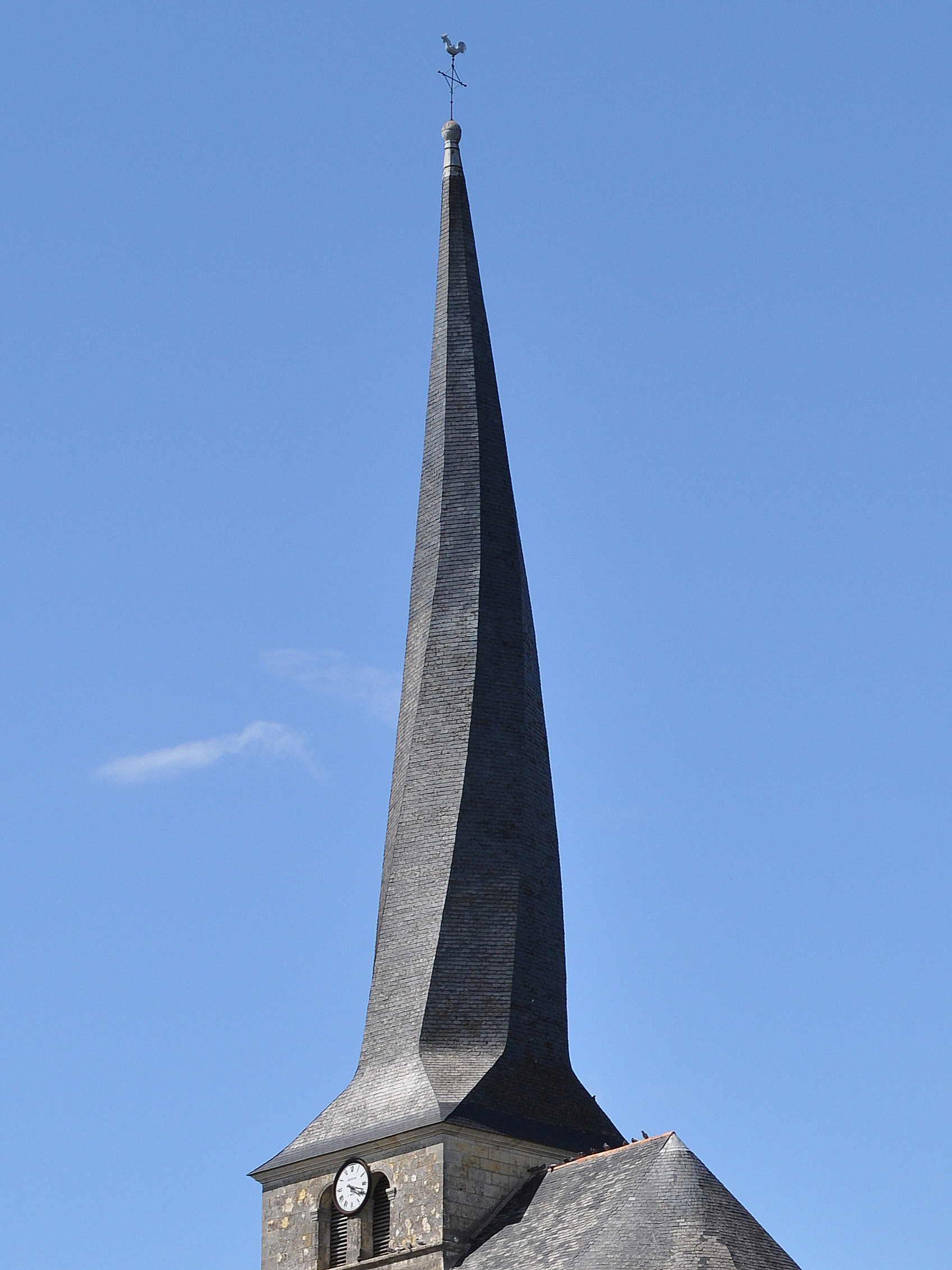 Eglise Saint-Symphorien du Vieil-Baugé (Maine-et-Loire)